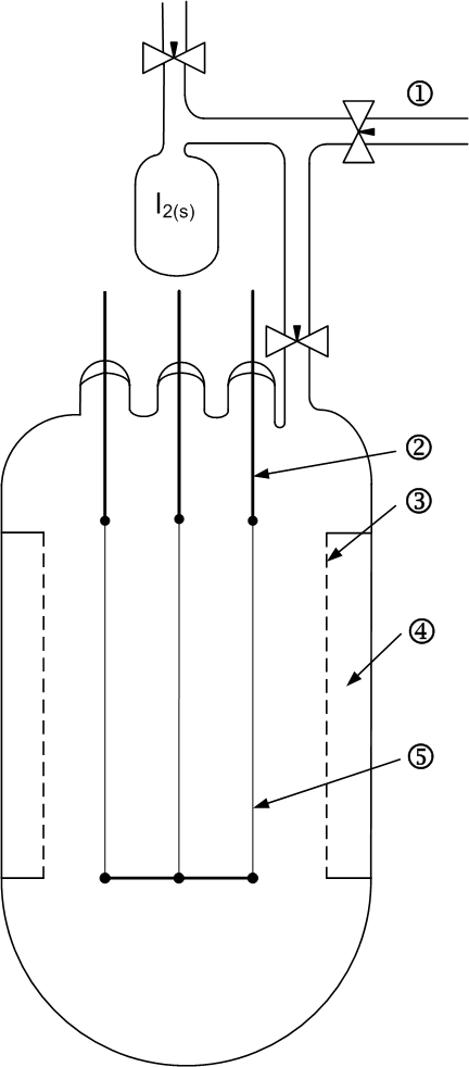 Van-Arkel-de-Boer-Apparat 1: zur Vakuumpumpe, 2: 6 mm Molybdänelektrode, 3: Molybdännetz, 4: Kammer für das Rohmetall, 5: 0,06 mm Wolframdraht